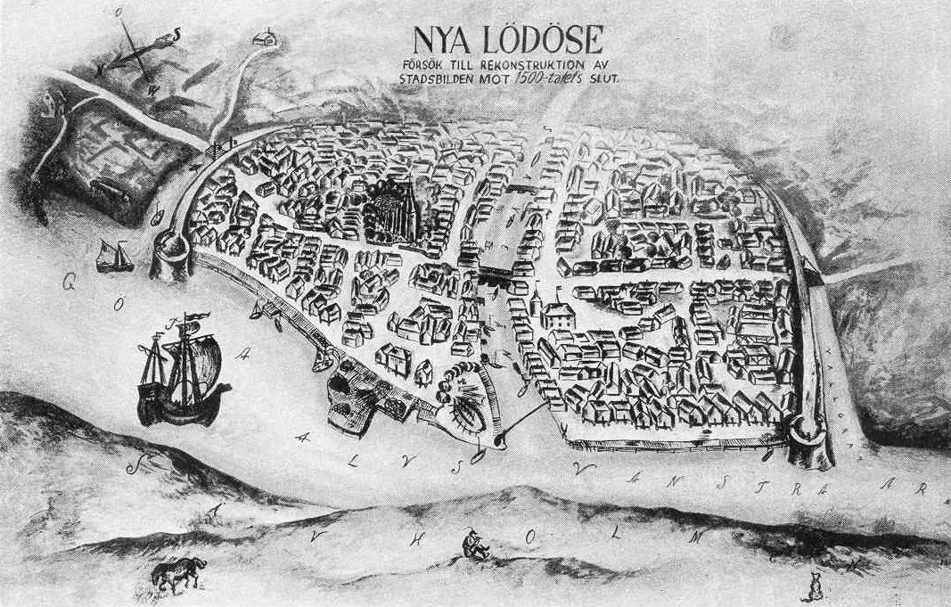 Nya Lödöse. Försök till rekonstruktion av stadsbilden mot 1500-talets slut. Efter dekorativ kalkmålning, utförd år 1923 i Göteborgs jubileumsutställnings Nya Lödöse-rum av Per Källström och Sixten Strömbom. Med ledning av utgrävningarnas resultat 1915-1918 och av arkivaliska uppgifter sökte Sixten Strömbom rekonstruera huvuddragen i stadens gestaltning. Gatunätet tänkes utgå från Landsvägsgatan (ungefär i Göta älvs riktning) och ågatorna längs Säveån. På södra sidan om ån synes Landsvägsgatan vidga sig till Stora torget, där rådhuset ligger, på norra stranden gå gatorna mellan bodar och magasin ned mot hamnbryggan. I hörnet strax nordost om stadsbron synes stadskyrkan med begravningsplatsen. Mot landsbygden skyddas staden av vallgrav och grav. Längst i norr finnes hospitalet (det forna Gråbrödraklostret). Säveån rinner genom stadens centrum och Göta älven längs hamnkajerna. På andra sidan älven finnes Säveholmen. Ur "Forskingar på platsen för det forna Nya Lödöse (1915-1918)", av Sixten Strömbom, Göteborg 1924, sidan 182.